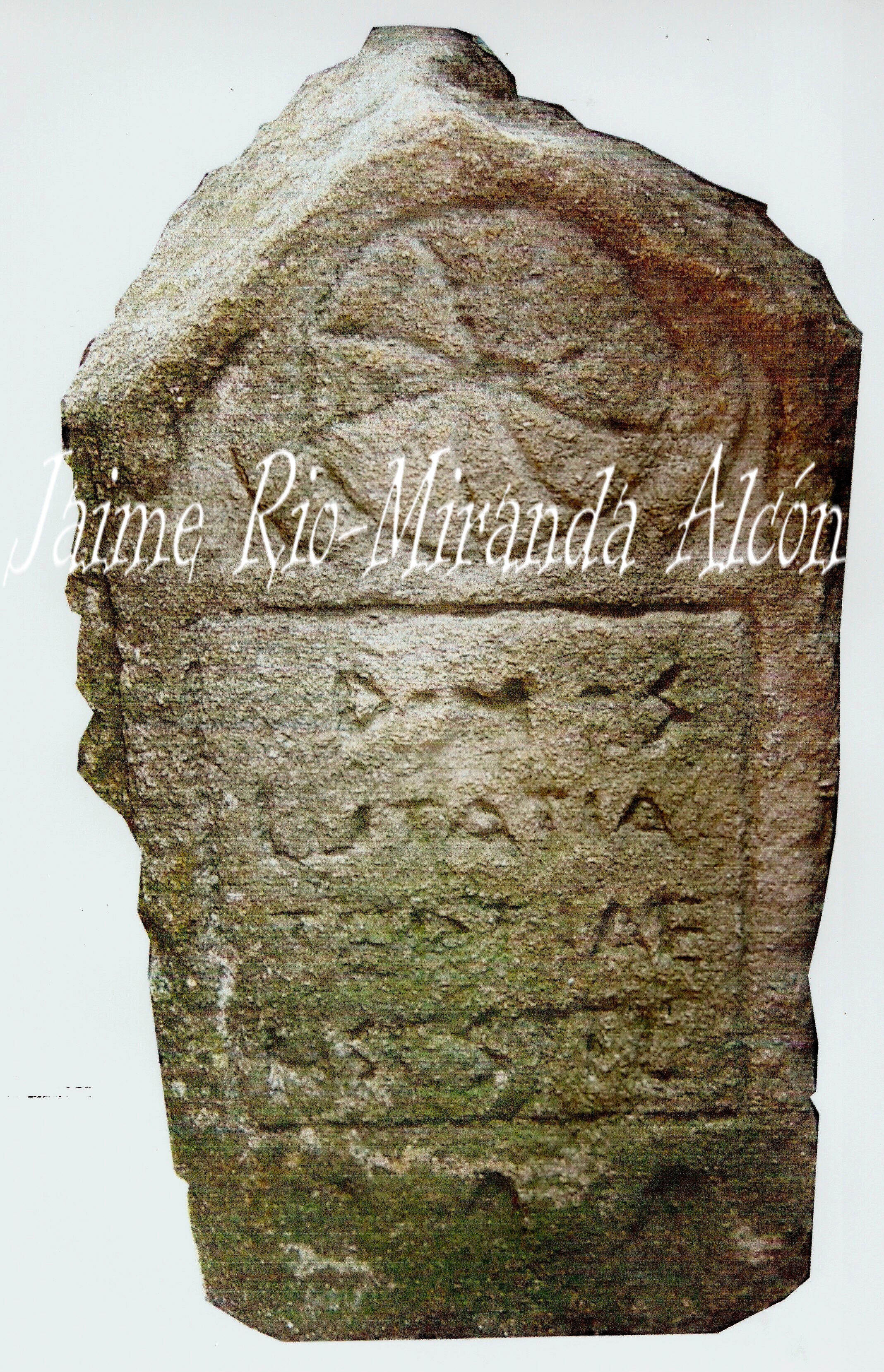 Estela romana a Lutatia hija de Tertiae